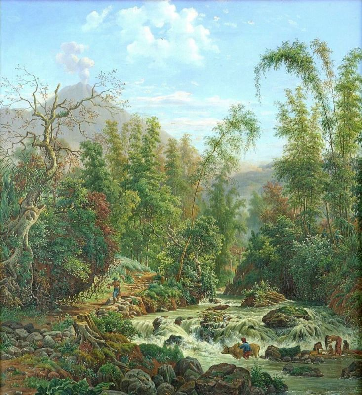 Olieverfschilderij. Waterval in de rivier Metro bij Malang